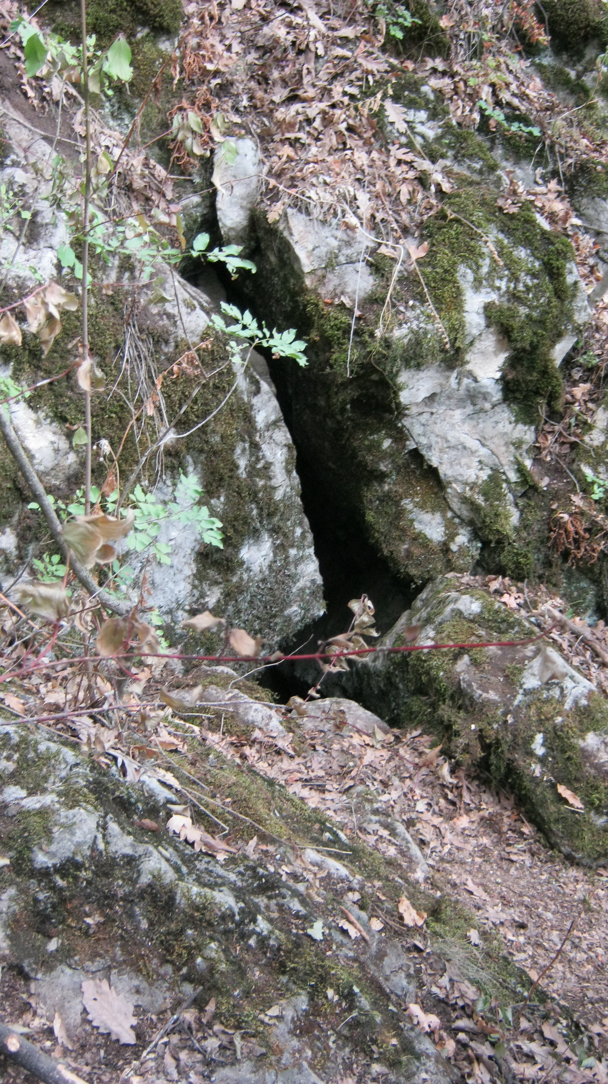 Српски (ћирилица): Сибничка јама на Гледићким планинама